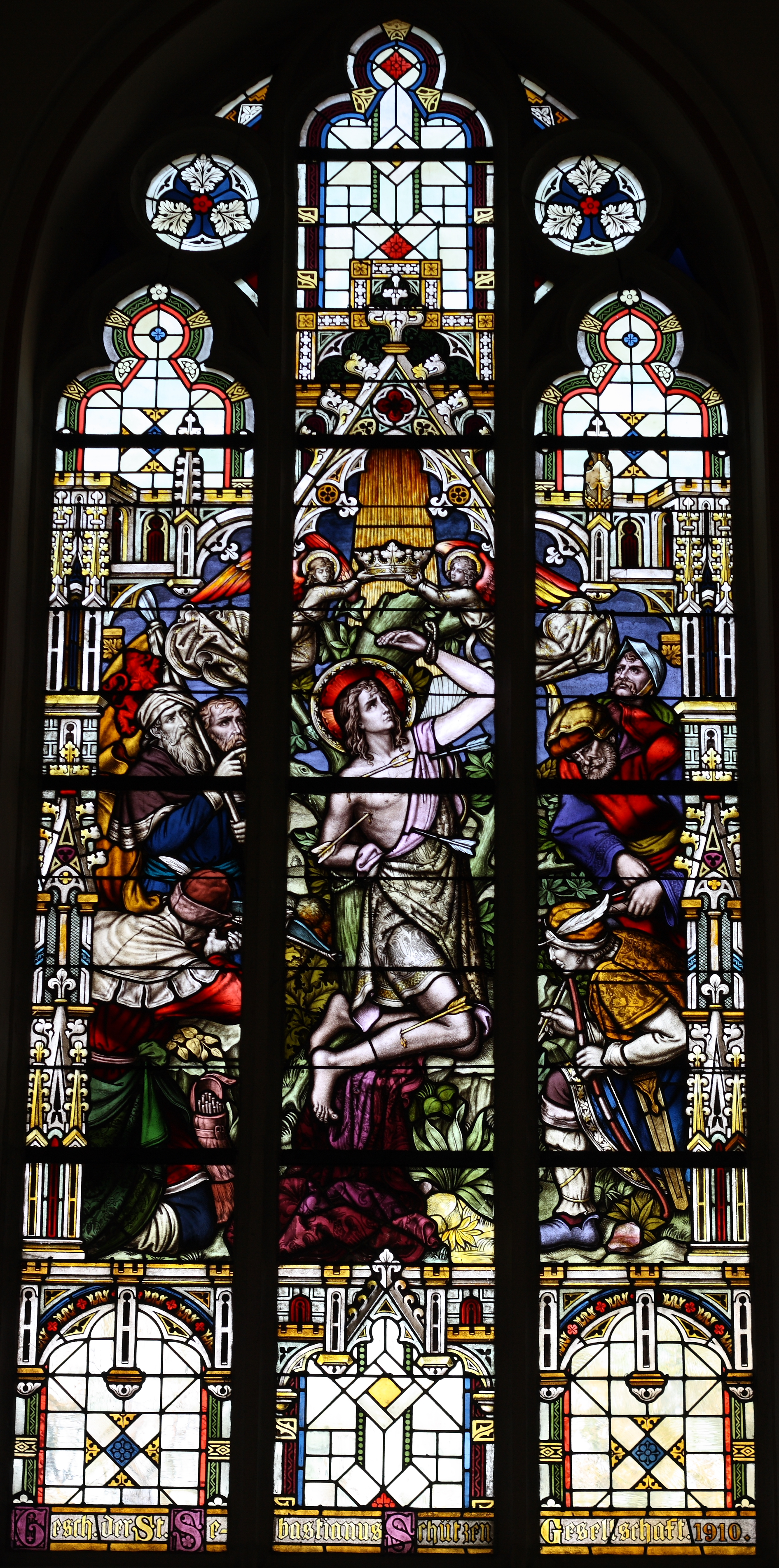 Bleiglasfenster (Fenster im Querschiff) in der katholischen Pfarrkirche St. Nikolaus in Kuchenheim, Darstellung: hl. Sebastian, Ausführung: Glasmalerei Oidtmann in Linnich , 1910 (siehe Freunde und Förderer des Stadtmuseums e. V. (Hrsg.): Die Kirchen und Kapellen in Euskirchen. Euskirchen 2006, S. 87f, ISBN 3-00-019035-X